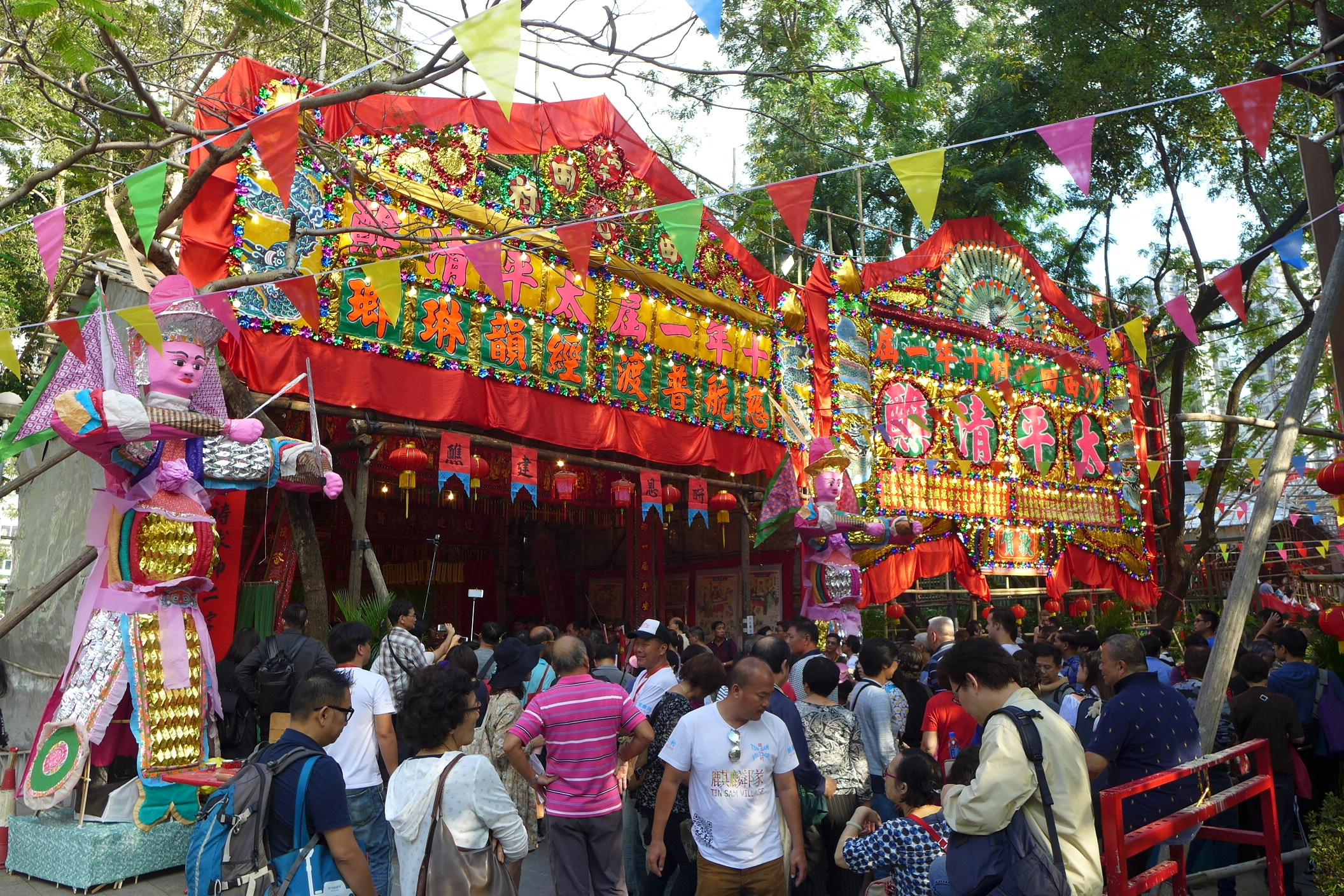 Tin Sam Village Da Jiu Festival